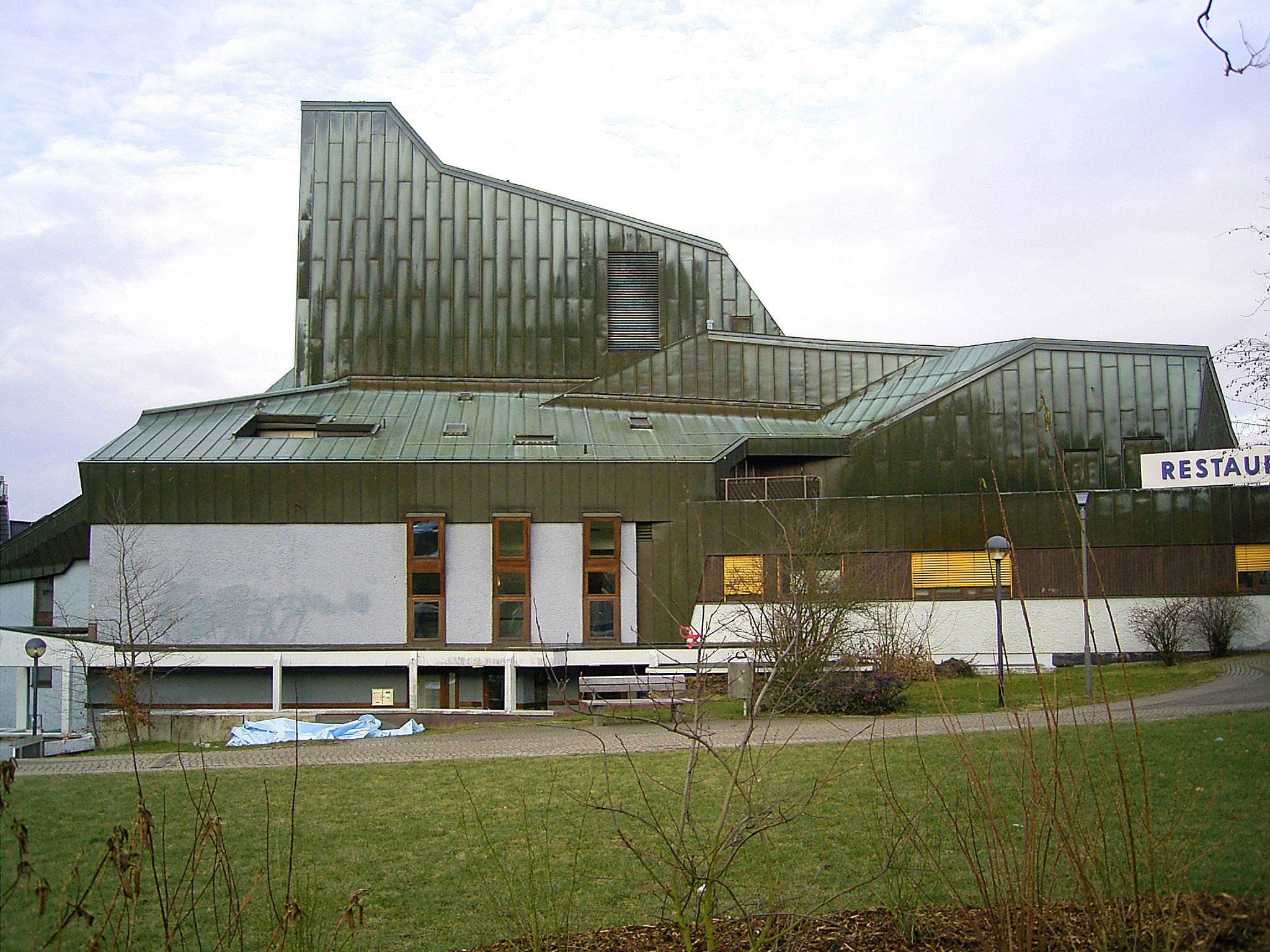 Lüdenscheid